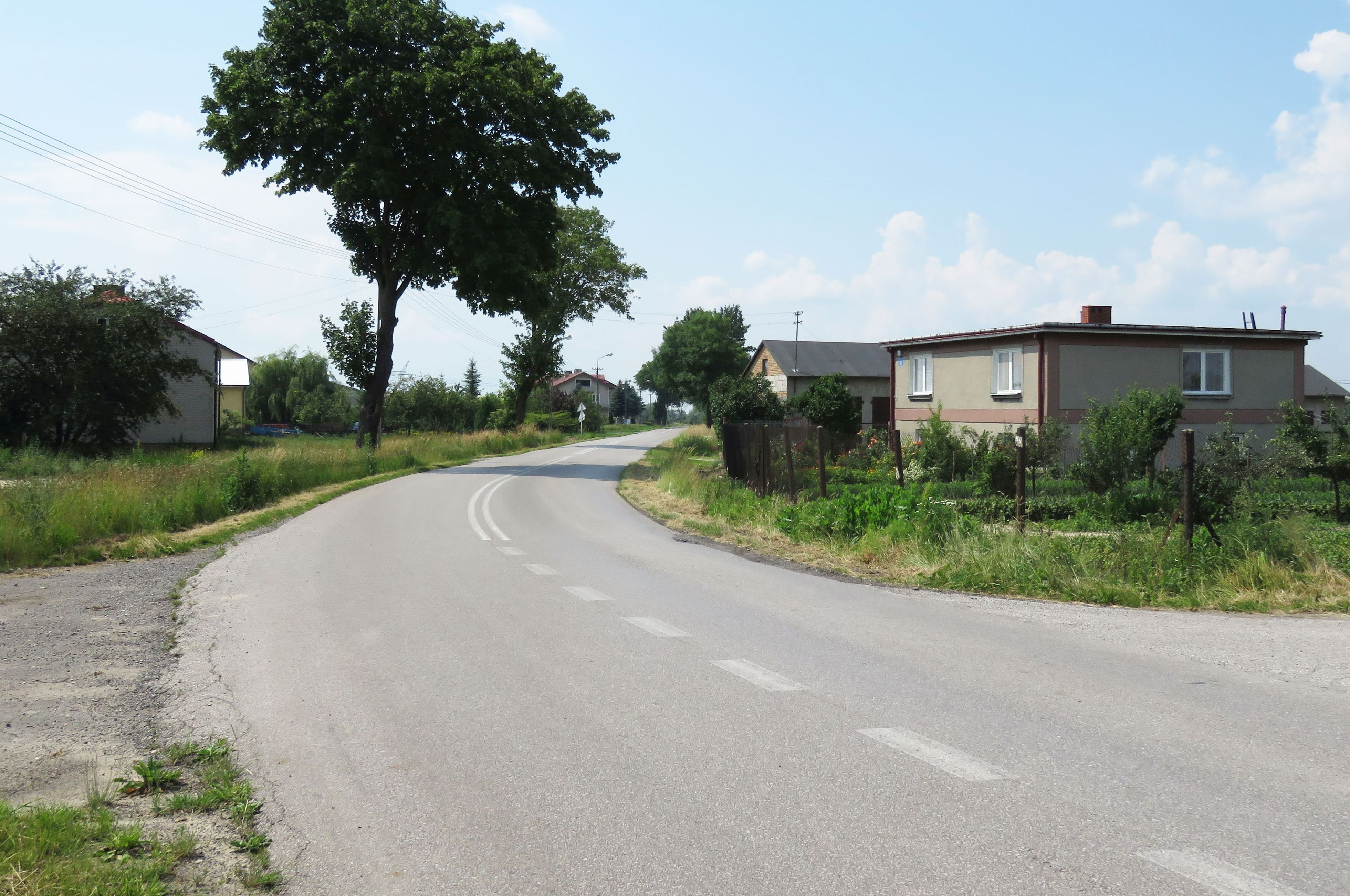 Wąsy - Kolonia, gmina Leszno